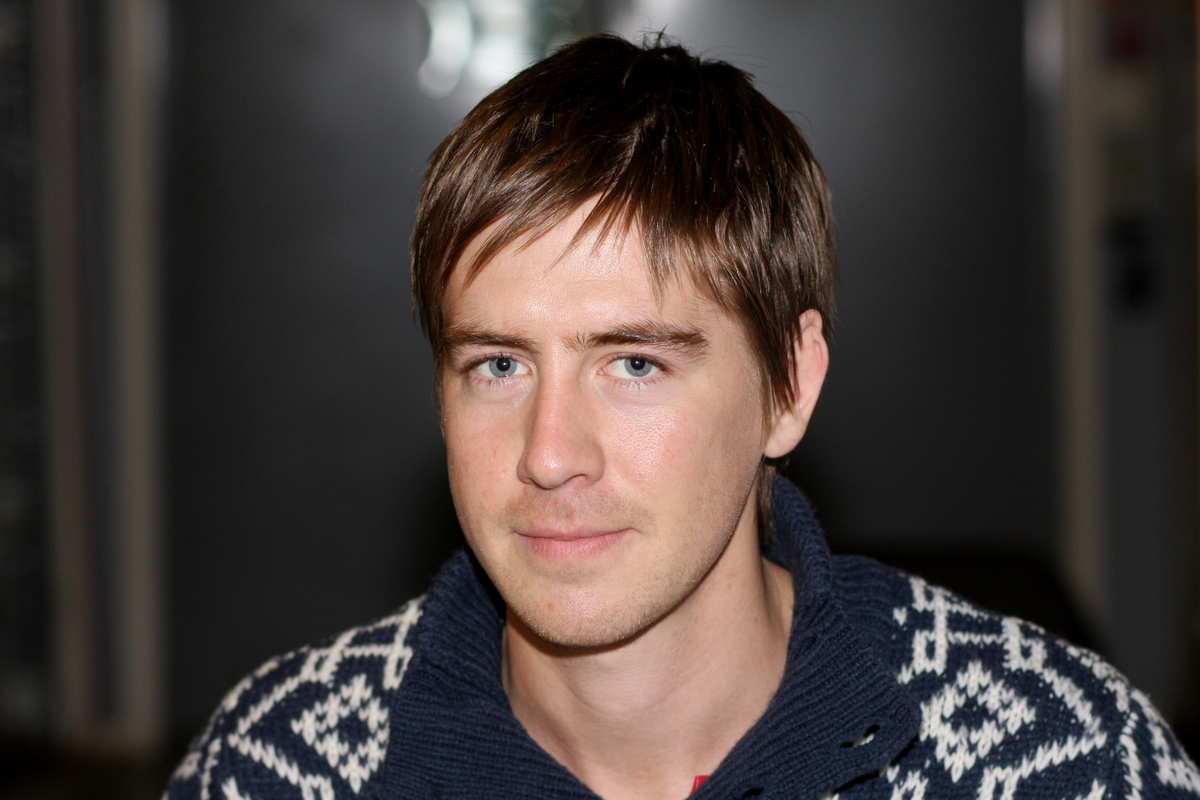 Pål Sverre Valheim Hagen i forbindelse med teateroppsetningen Lang dags ferd mot natt